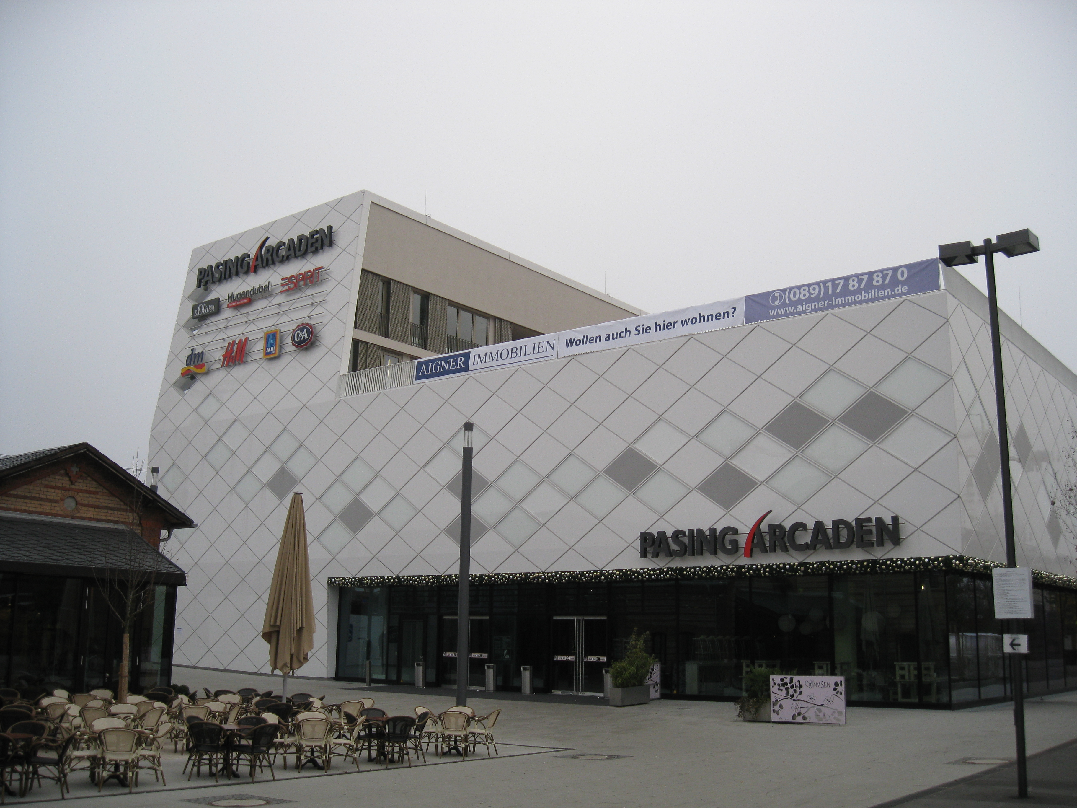 Pasing Arcaden - Einkaufszentrum in München / Pasing